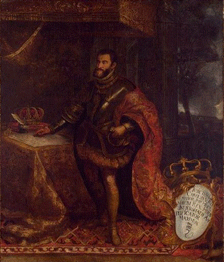 Retrato del emperador Carlos V (1500-1558)